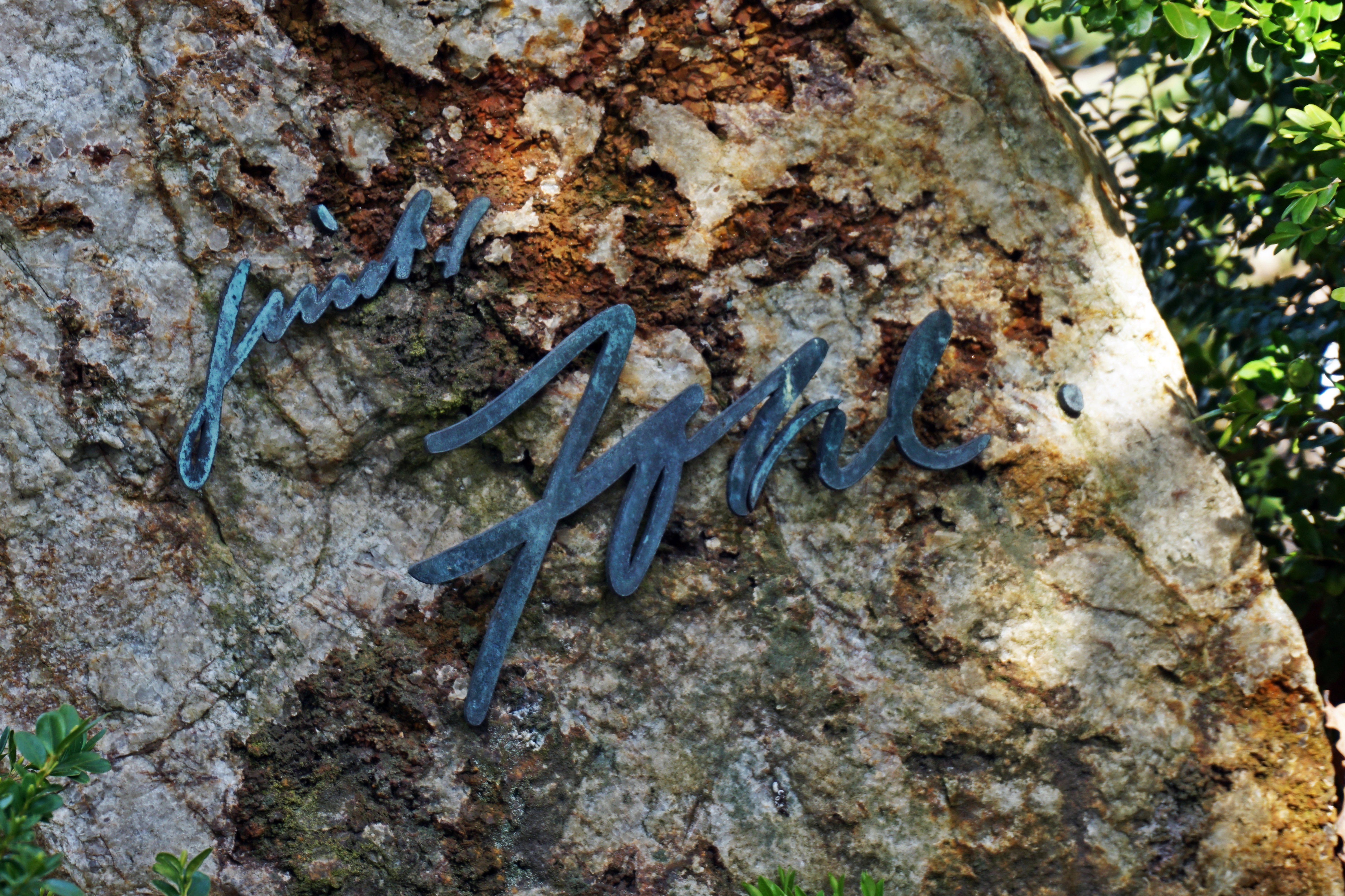 Grabmal des Künstlers Günter Johl (1908-1965) auf dem Alten Friedhof Wannsee in Berlin.